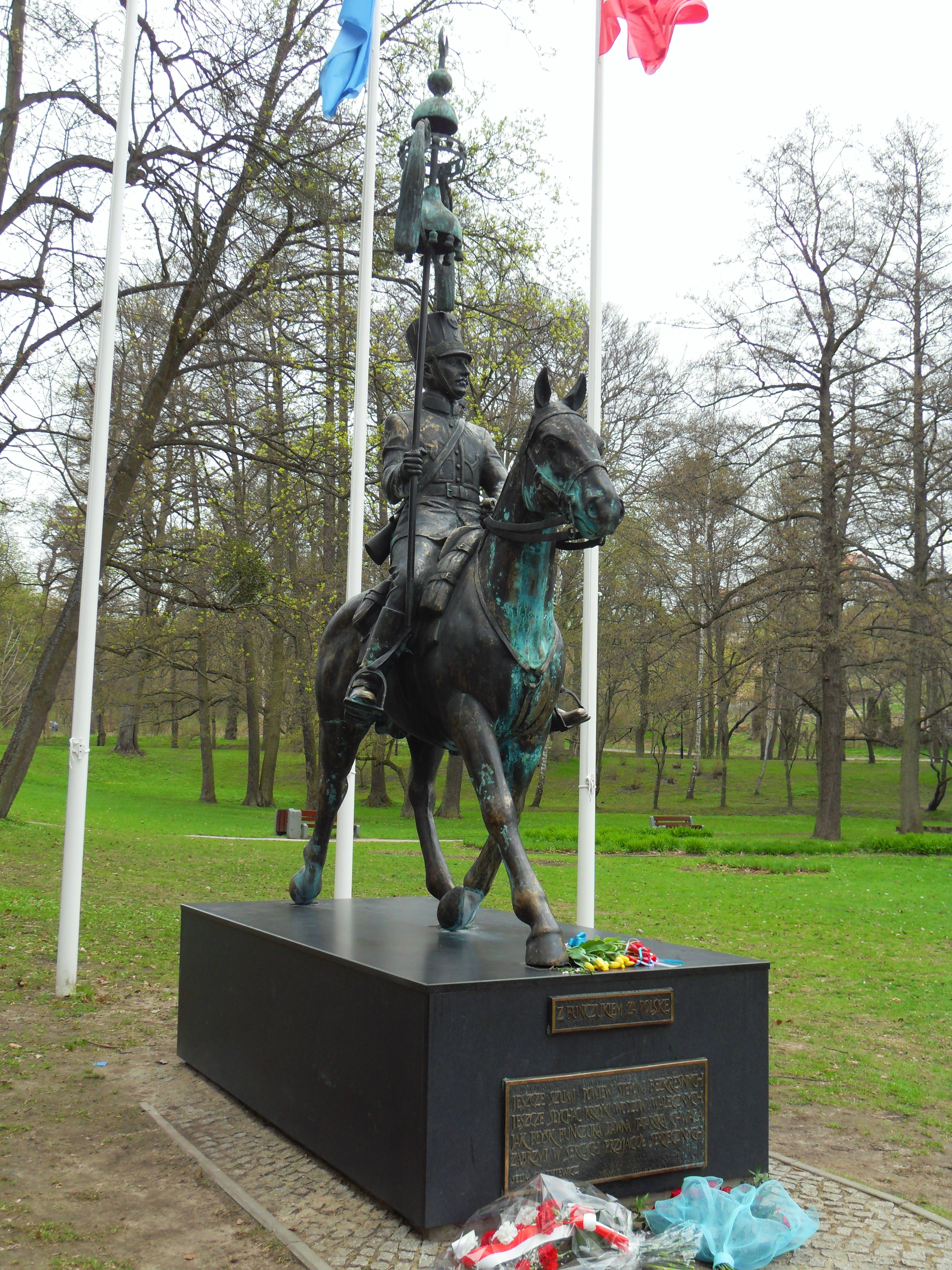 Gdańsk Orunia. Pomnik Tatara w Parku Oruńskim.